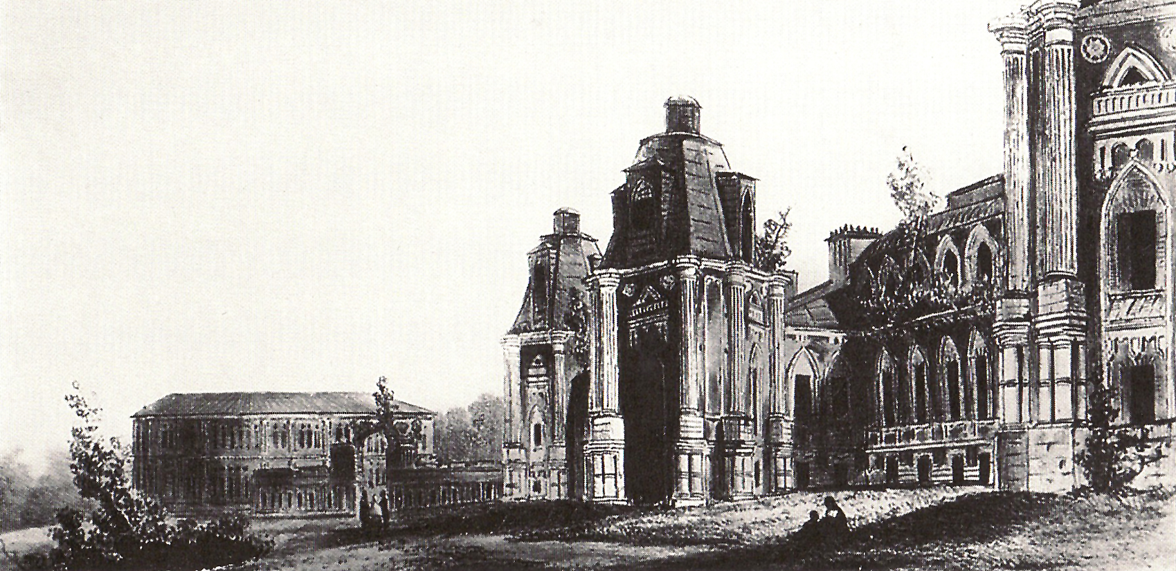 Большой Царицынский дворец во второй половине XIX века. Литография